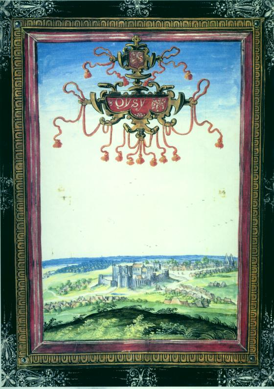 Vue du village d'Oisy, les ruines de son château, son église, les masures et les ruines de ce qui pourrait être les restes de l'Hôtel-Dieu